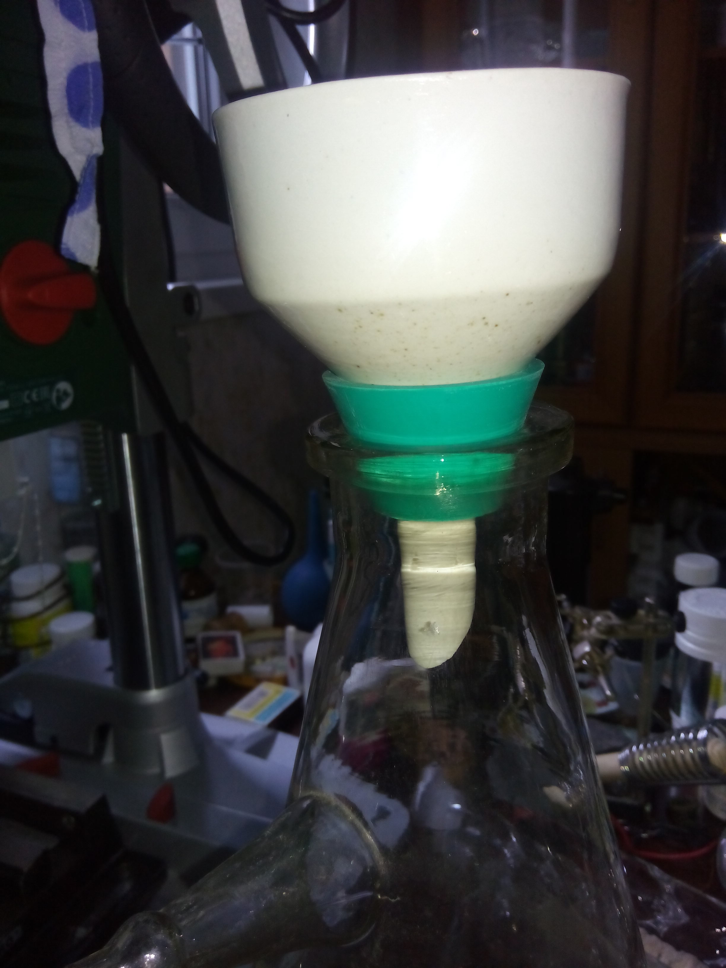 Воронка Бюхнера с силиконовой манжетой вставлена в колбу Бунзена